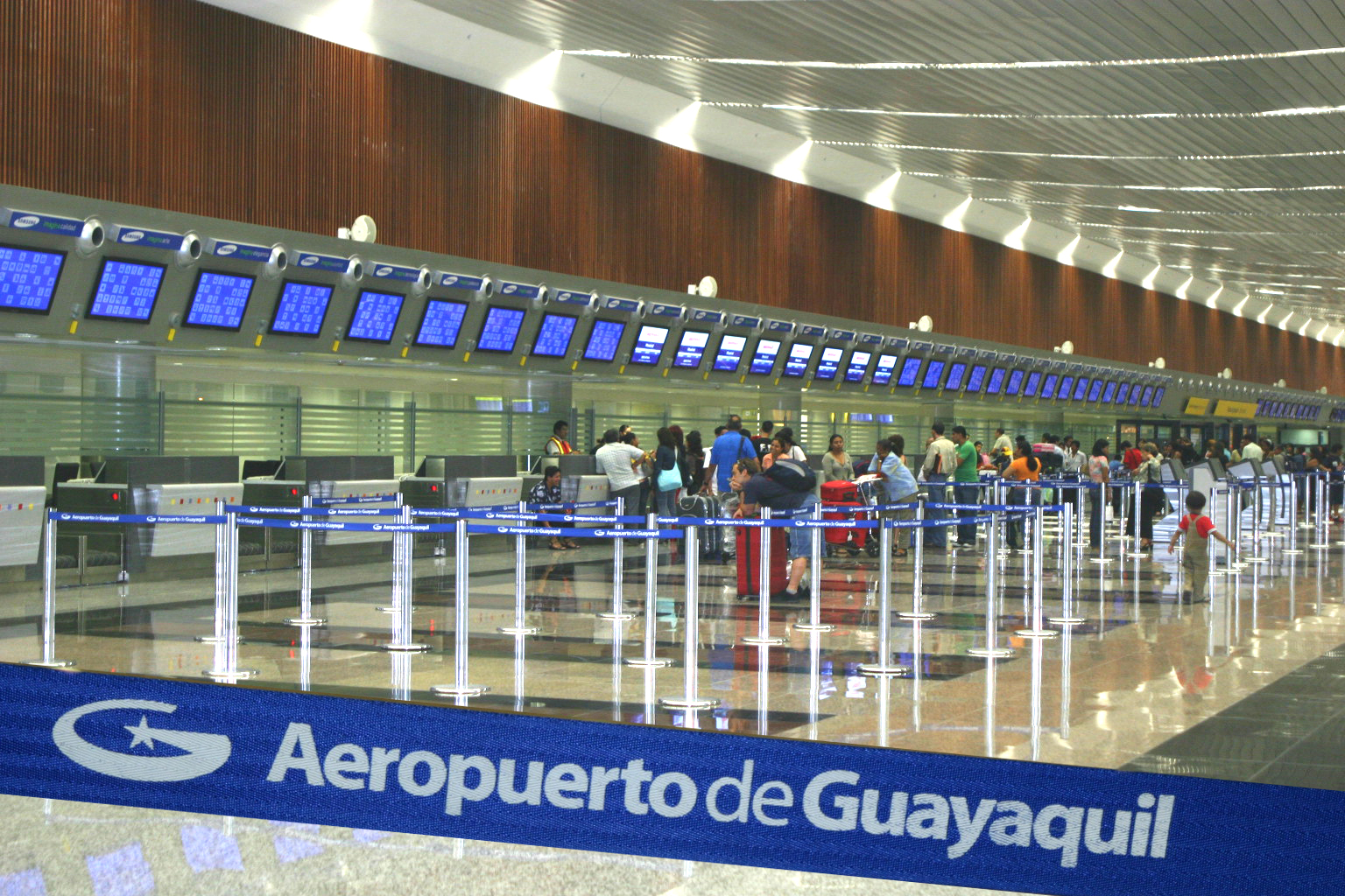 José Joaquín de Olmedo International Airport